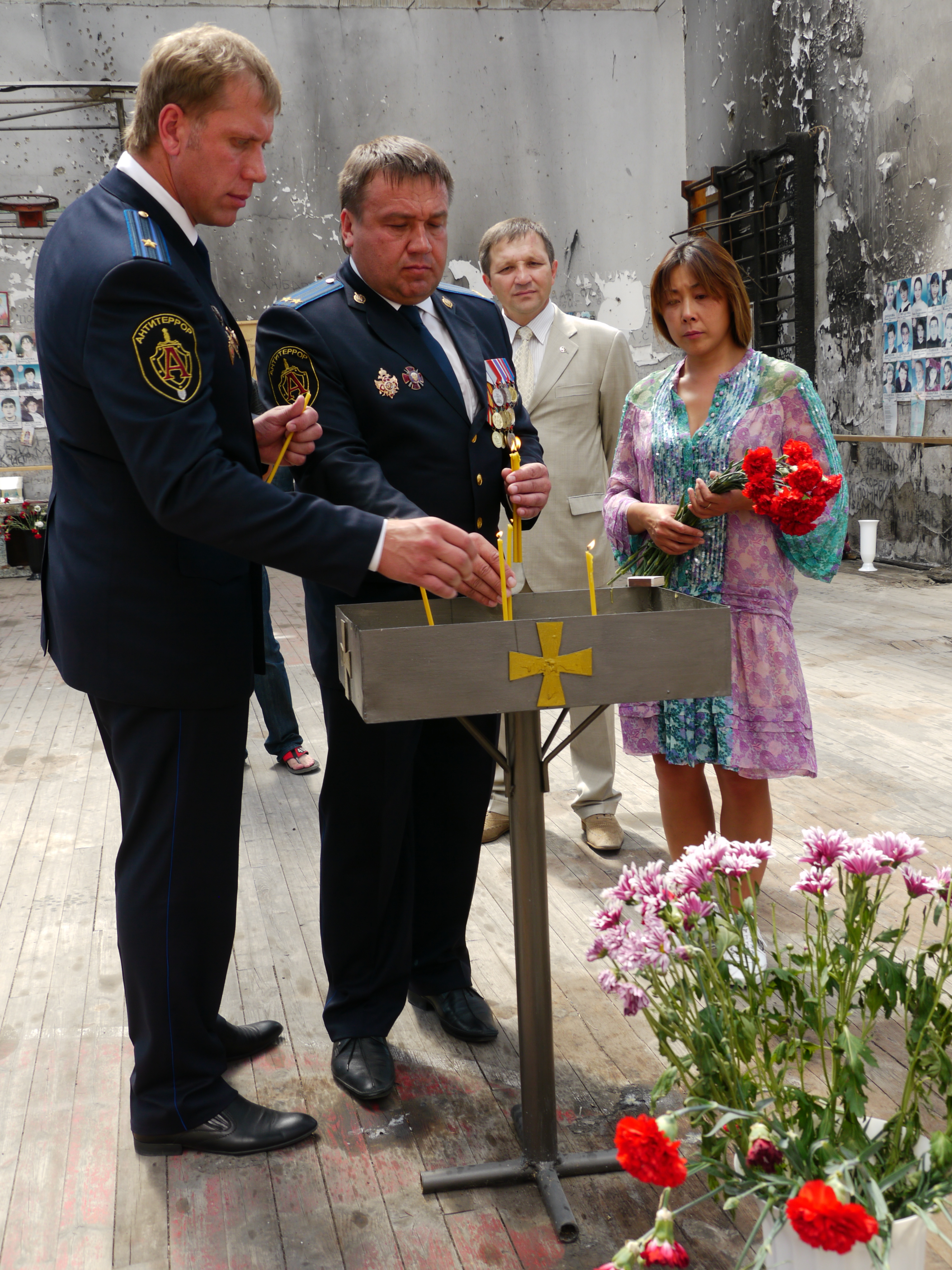 Геннадий_Соколов,_Алексей_Филатов_и_Анита_Цой_на_мемориале_школы_№1_г._Беслана._2009_г.